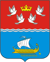 Герб села Берегове (Феодосійська міська рада)